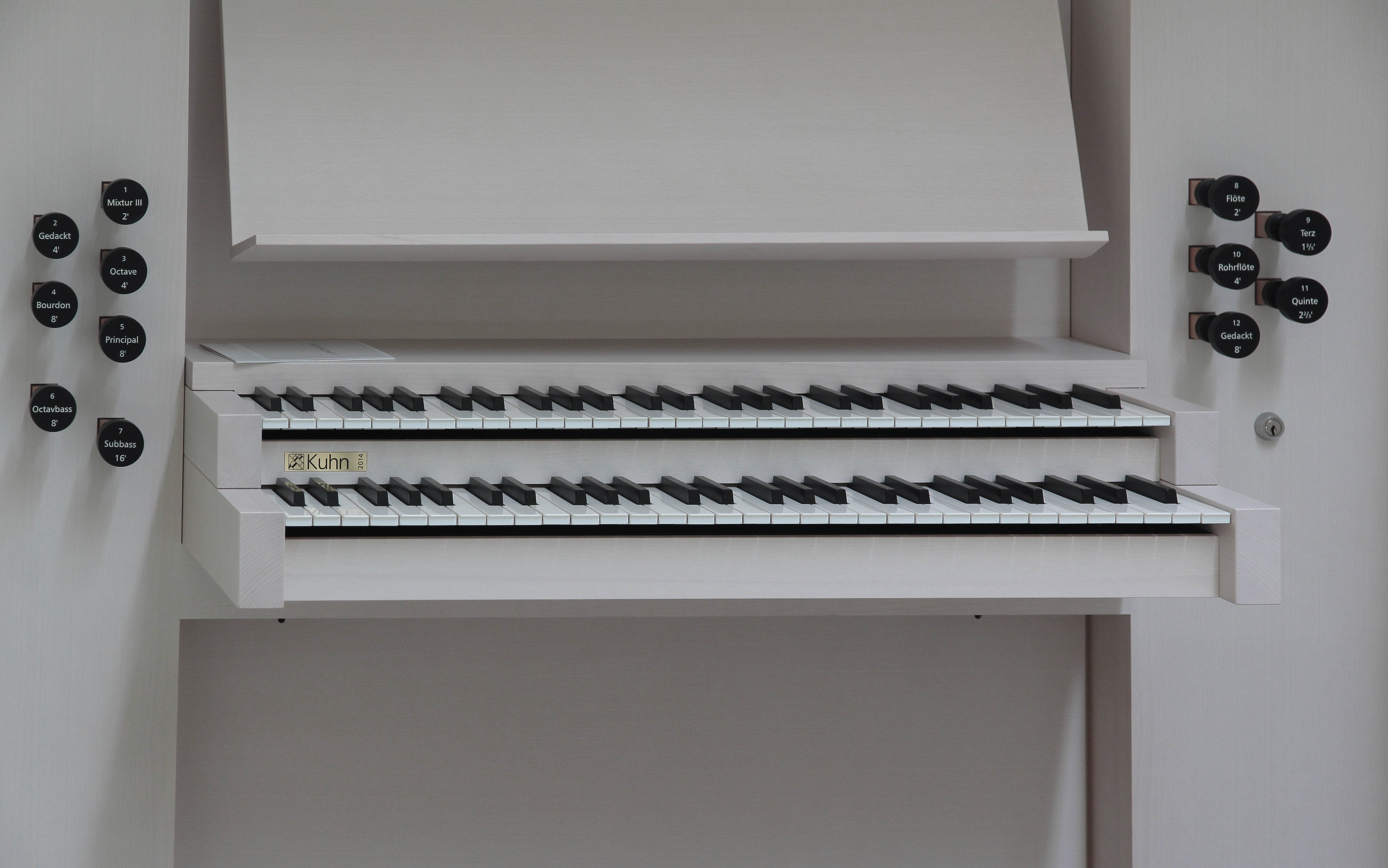 Römisch-katholische Kirche St. Franziskus Uetikon, Orgel